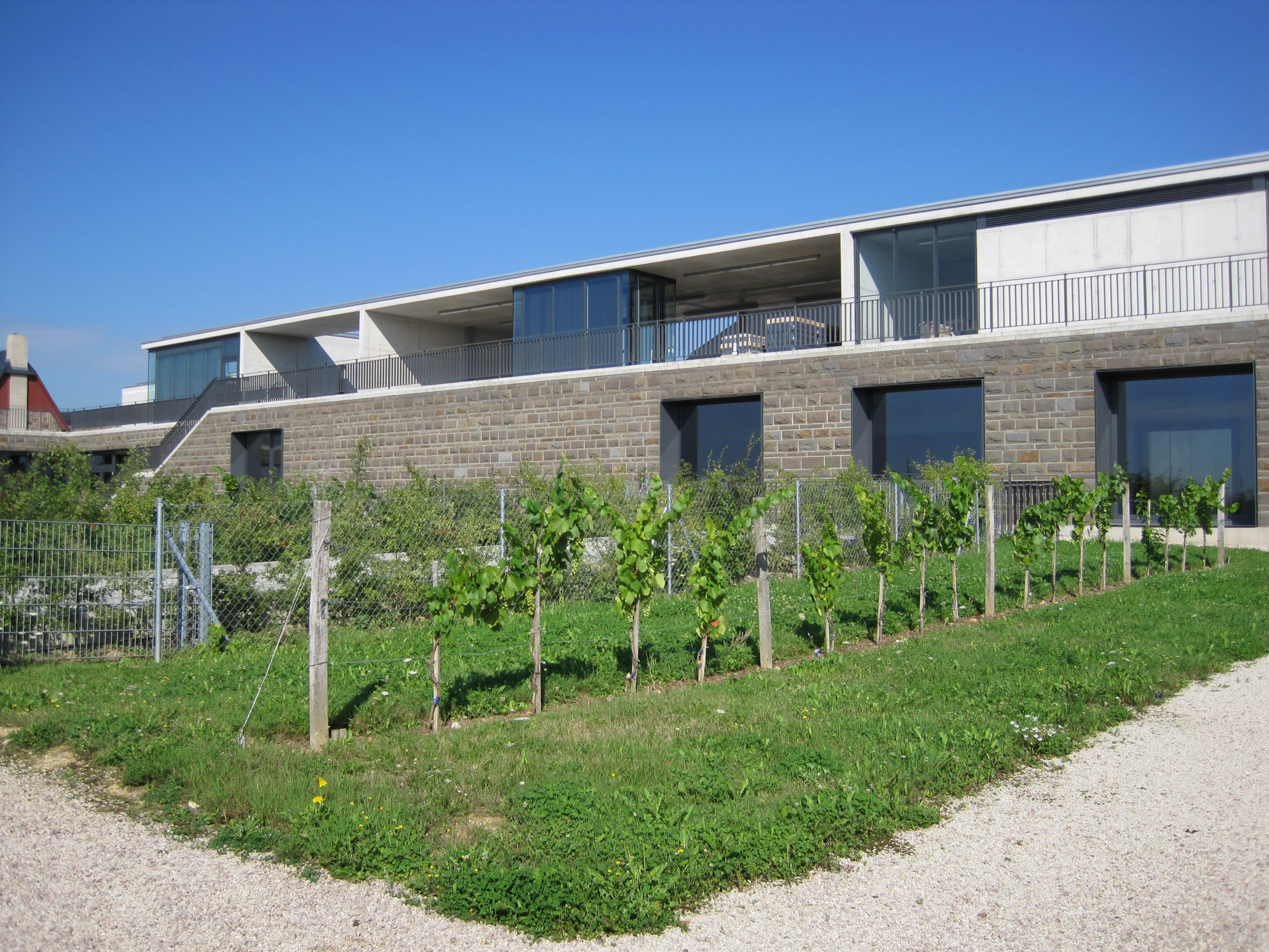 Der Steinbergkeller der Hessischen Staatsweingüter Kloster Eberbach im Steinberg